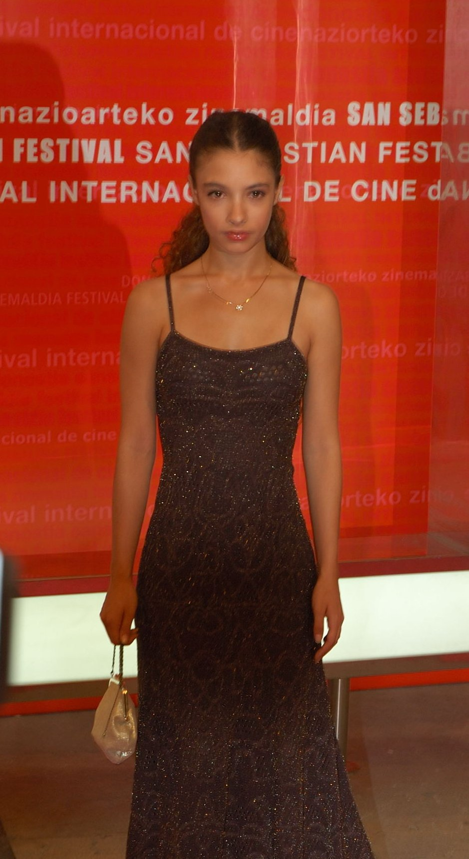 La actriz española Yohana Cobo en el Festival Internacional de Cine de San Sebastián 2006